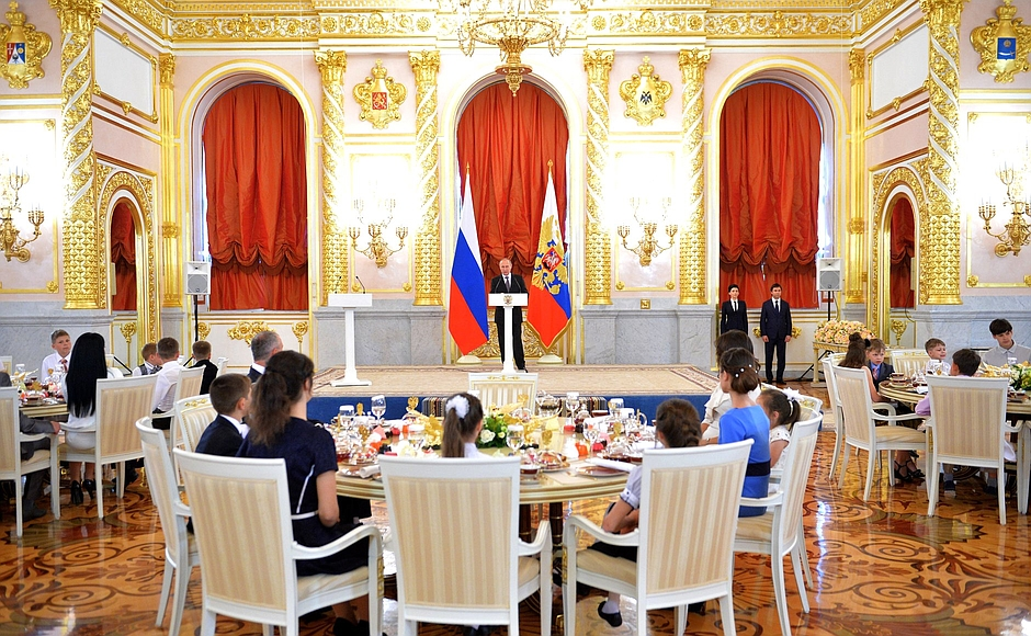 Владимир Путин на церемонии вручения ордена «Родительская слава». Москва, Кремль. 1 июня 2015.